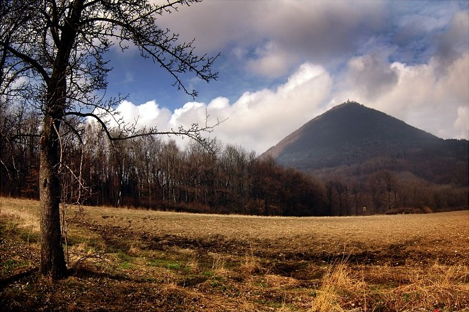 Milešovka, pohled od Milešova